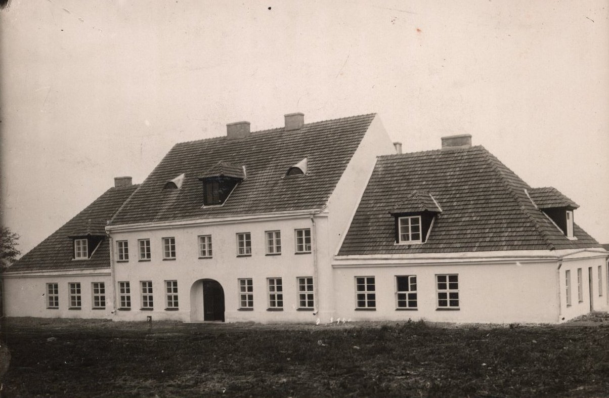 Budynek Niższej Żeńskiej Szkoły Rolniczej Sejmiku Suwalskiego w Kukowie.